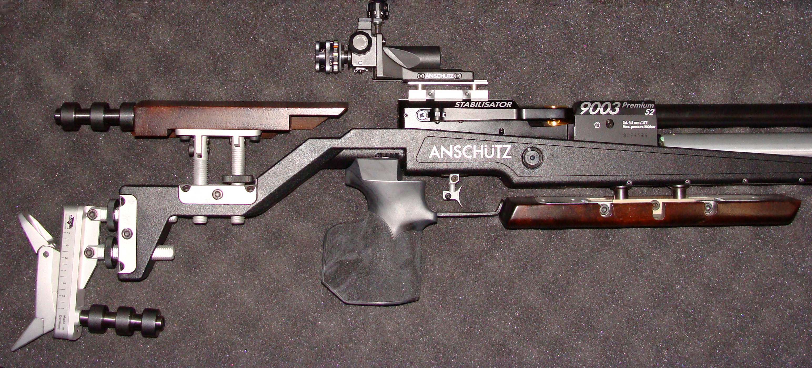 Anschütz9003 Holz